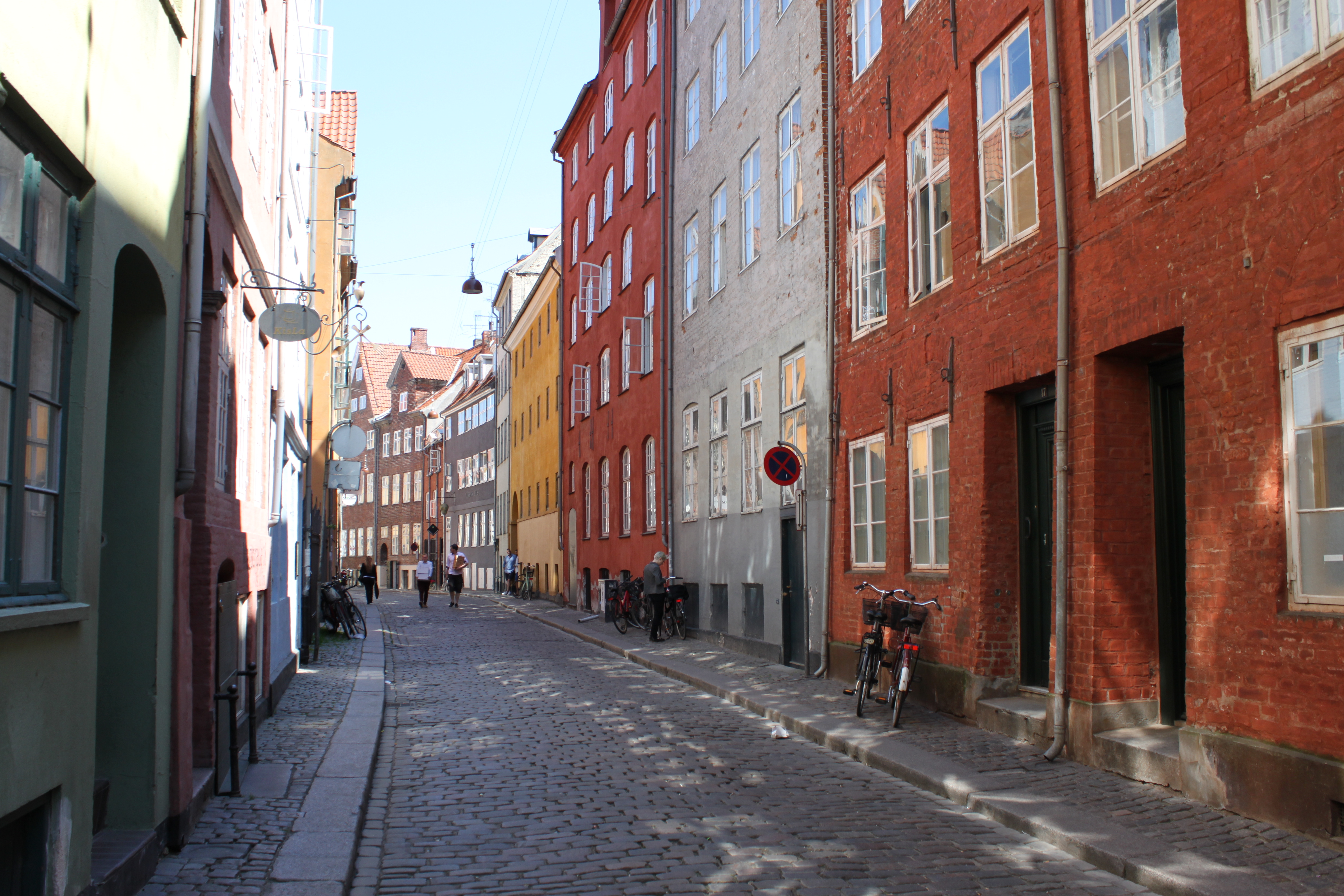 Mafstræde in Copenhagen, Denmark